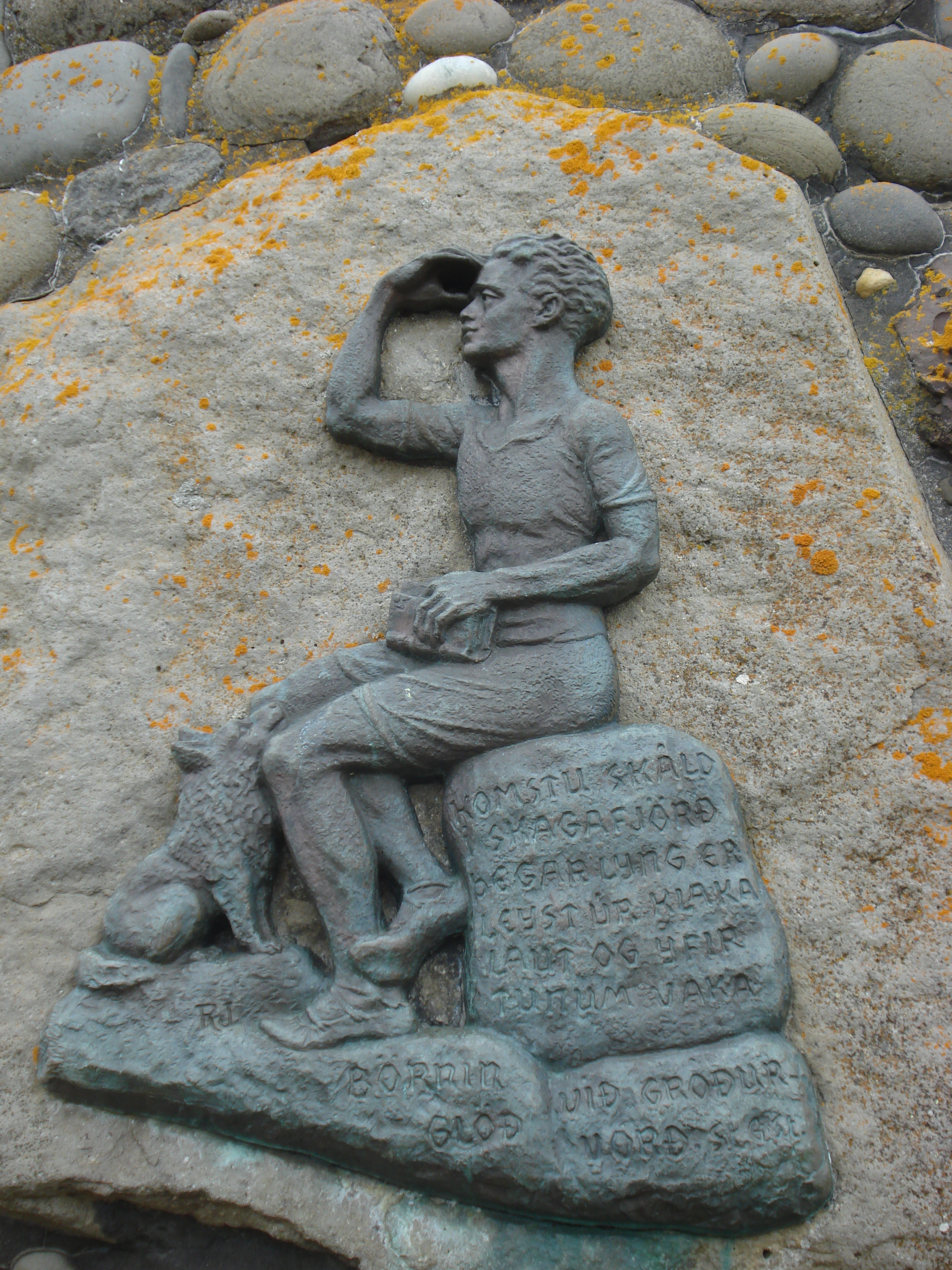 Stefán G. Stefánsson